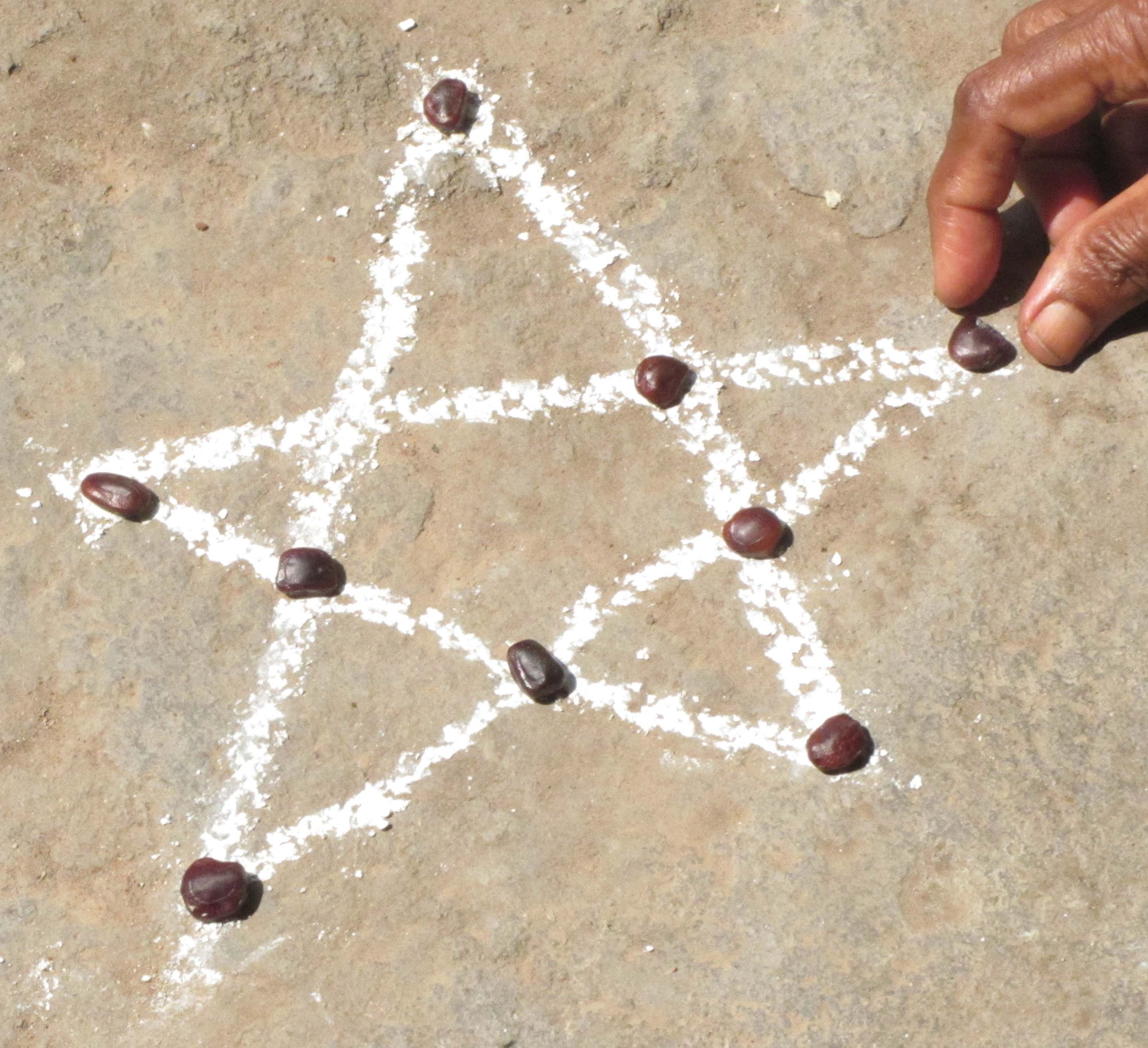 நட்சத்திர விளையாட்டு, முதியோர் விளையாட்டு, own shot